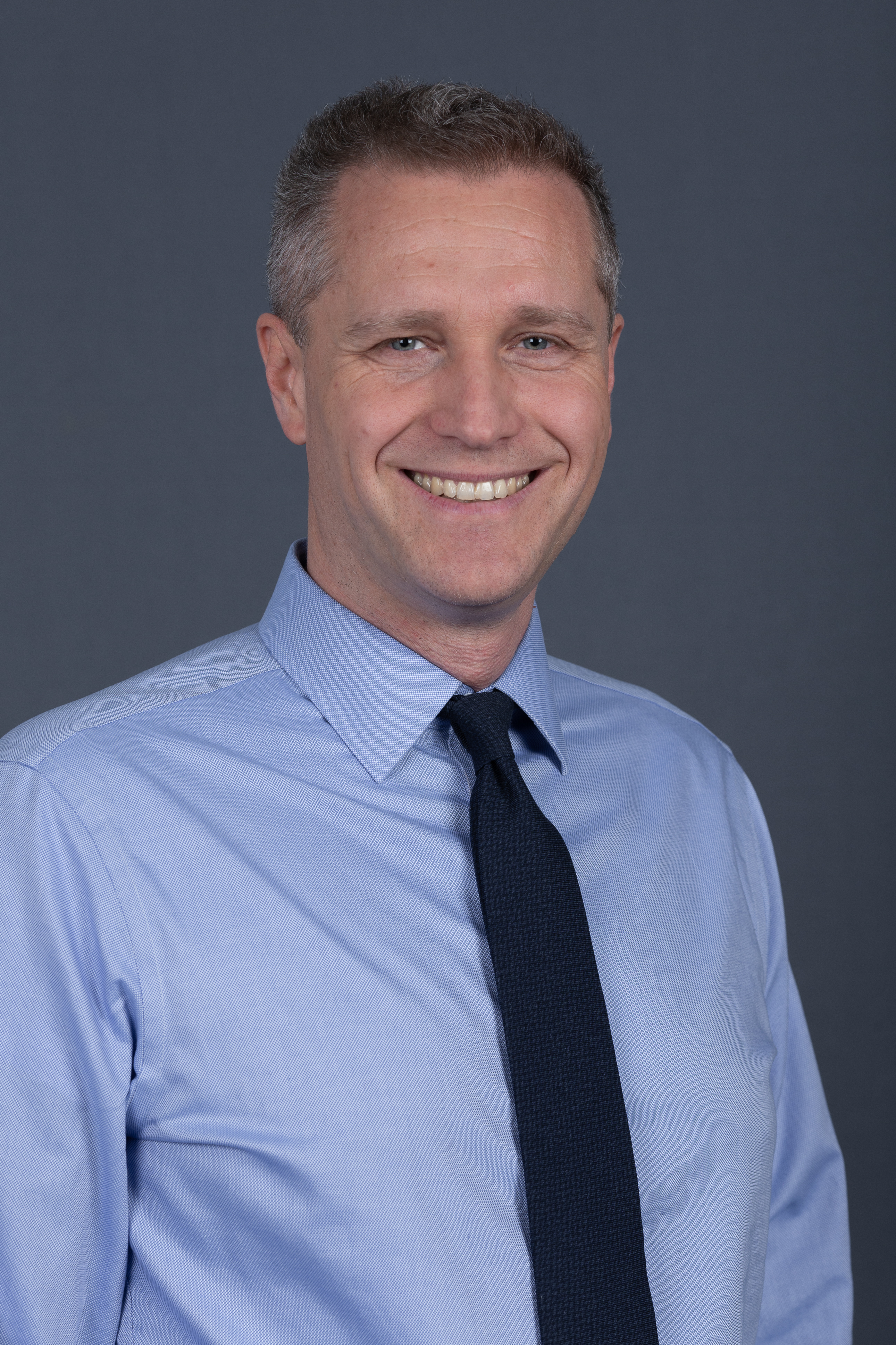 Deutscher Bundestag; Petr Bystron, AfD